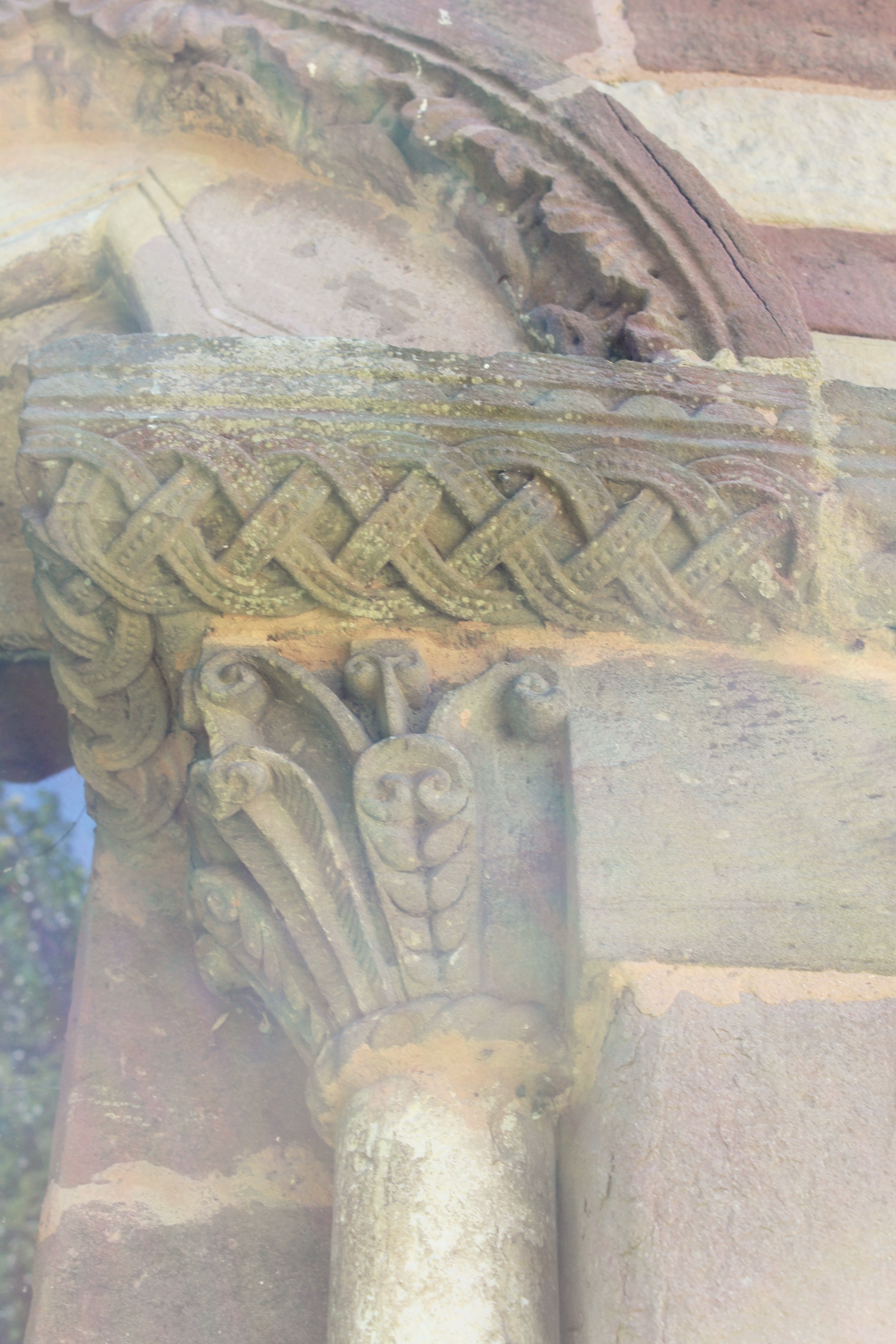 Capitel del ábside, zona derecha